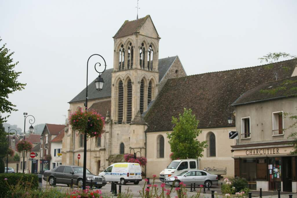 Église de Mézières-sur-Seine - Yvelines (France)